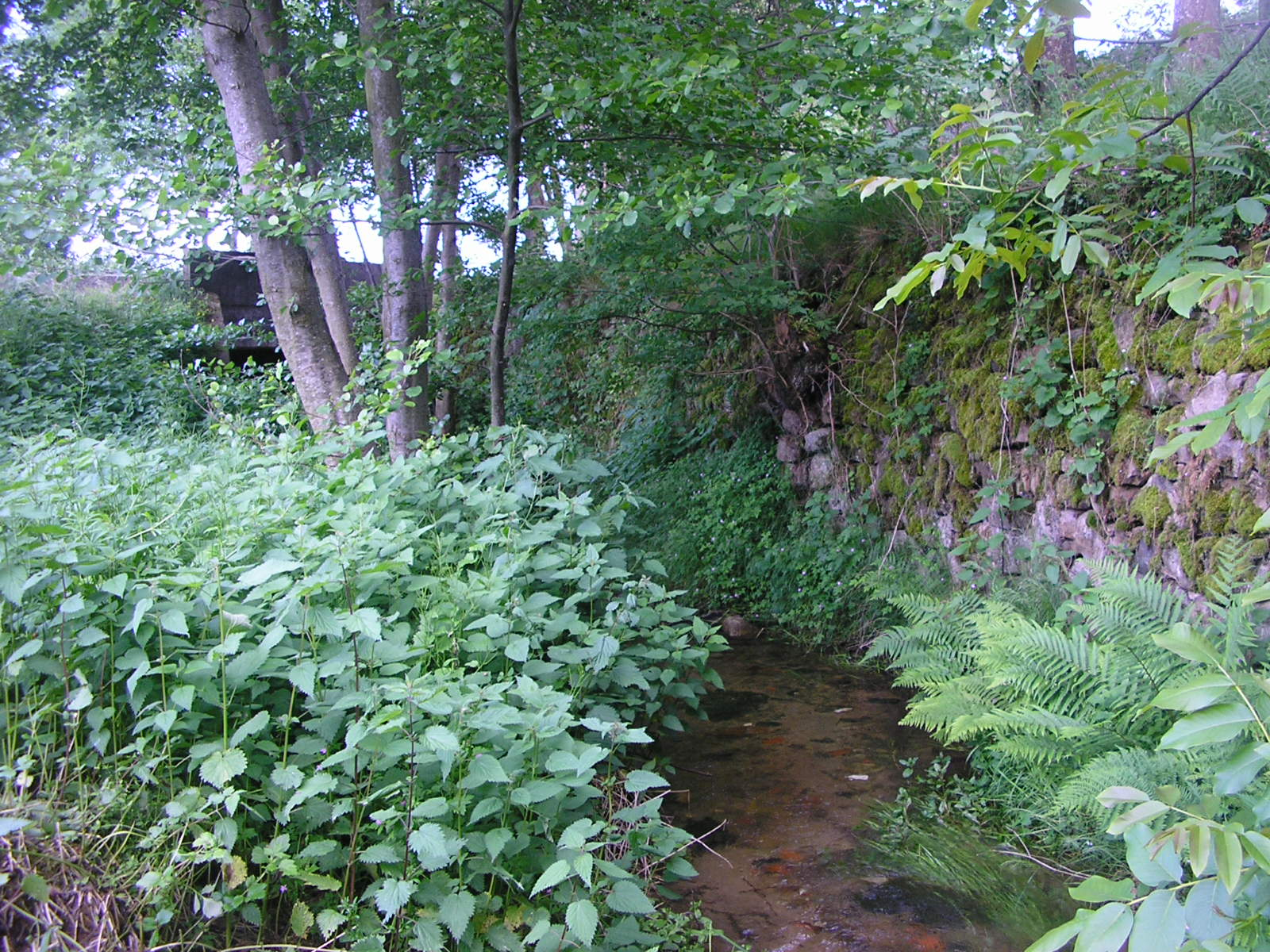 Photographie de la rivière Ternay au hameau du Mas,Sur la commune de Saint-Marcel-les-Annonay